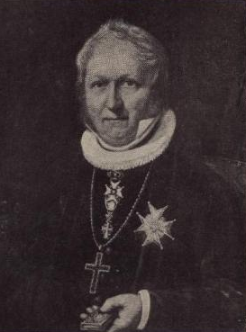 Biskop Jacob Neumann.